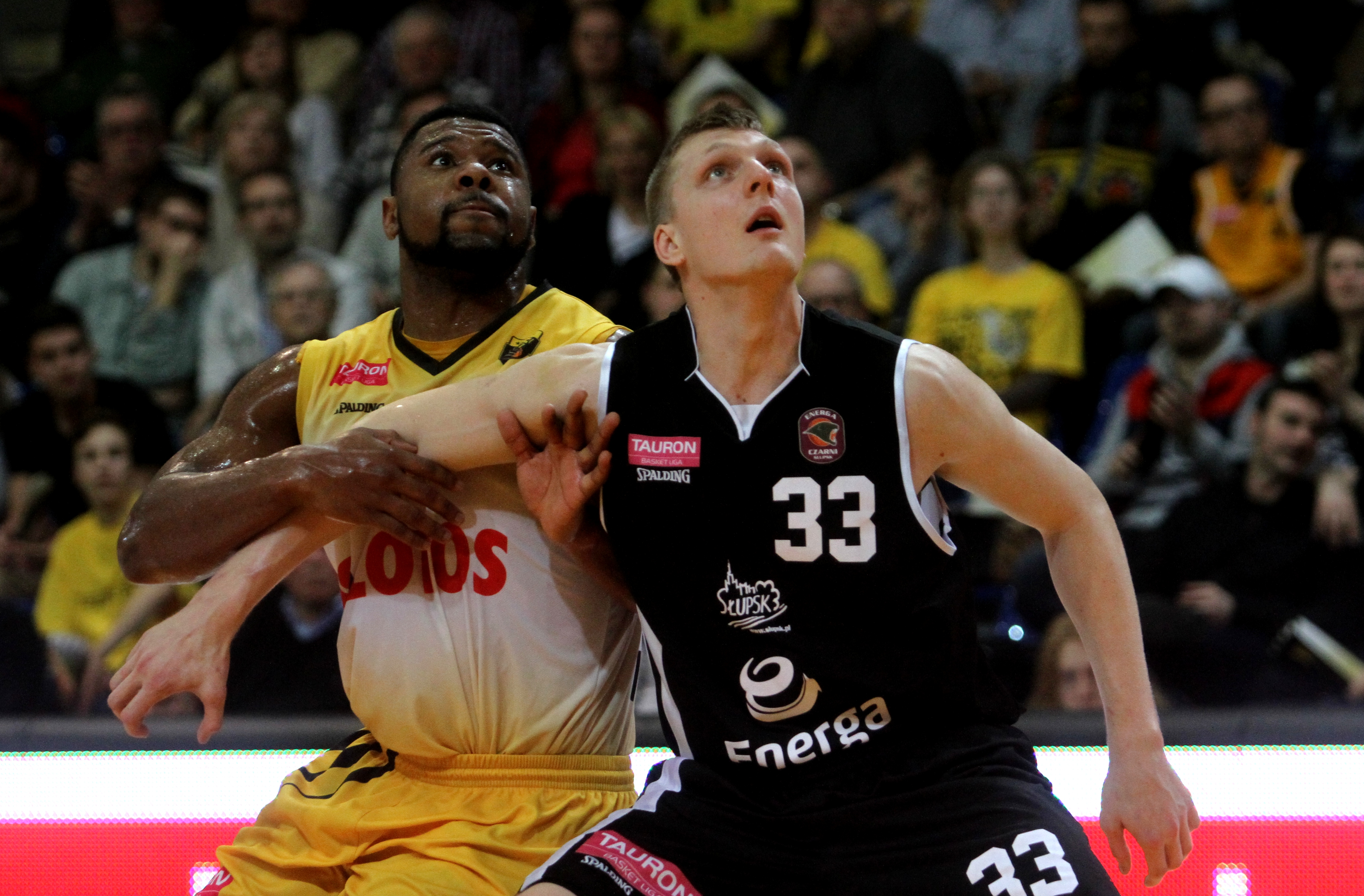 Lance Jeter Trefl Sopot, Karol Gruszecki Energa Czarni Słupsk